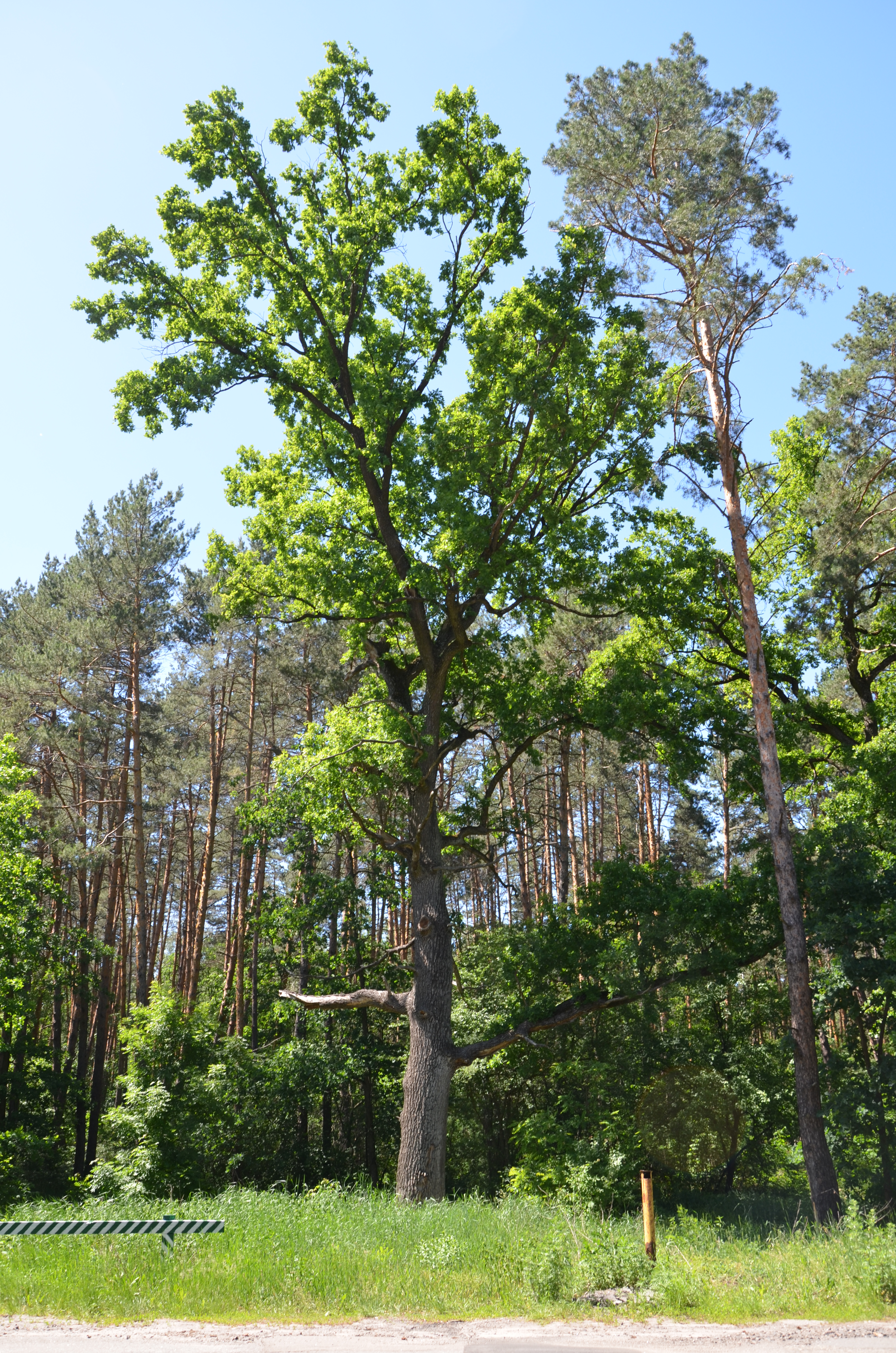 Чернечий ліс, Києво-Святошинський район